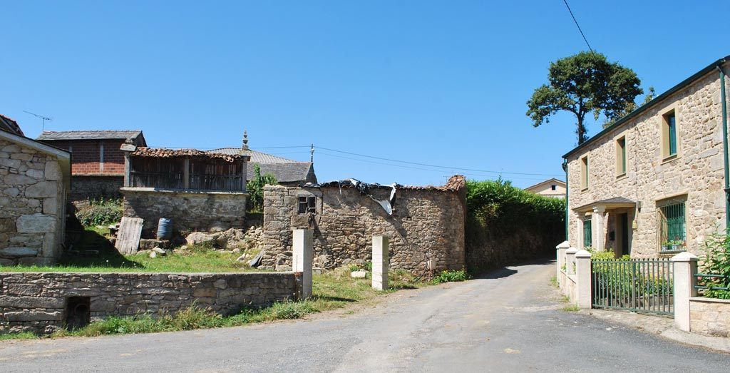 Vista da vila de Carballotorto en Aranga, provincia da Coruña, Galiza Spain